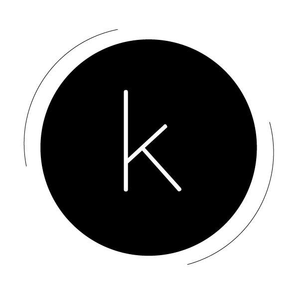 A blog lógója